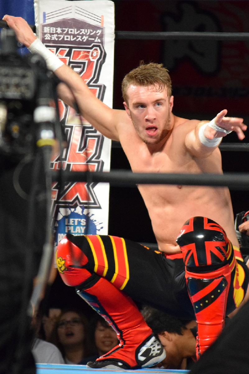 2016年5月29日 大阪市中央体育館・サブアリーナ 「BEST OF THE SUPER Jr.XXIII」 ウィル・オスプレイ